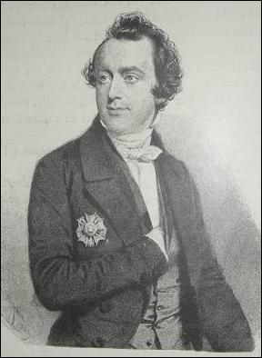 Frère-Orban, premier ministre belge